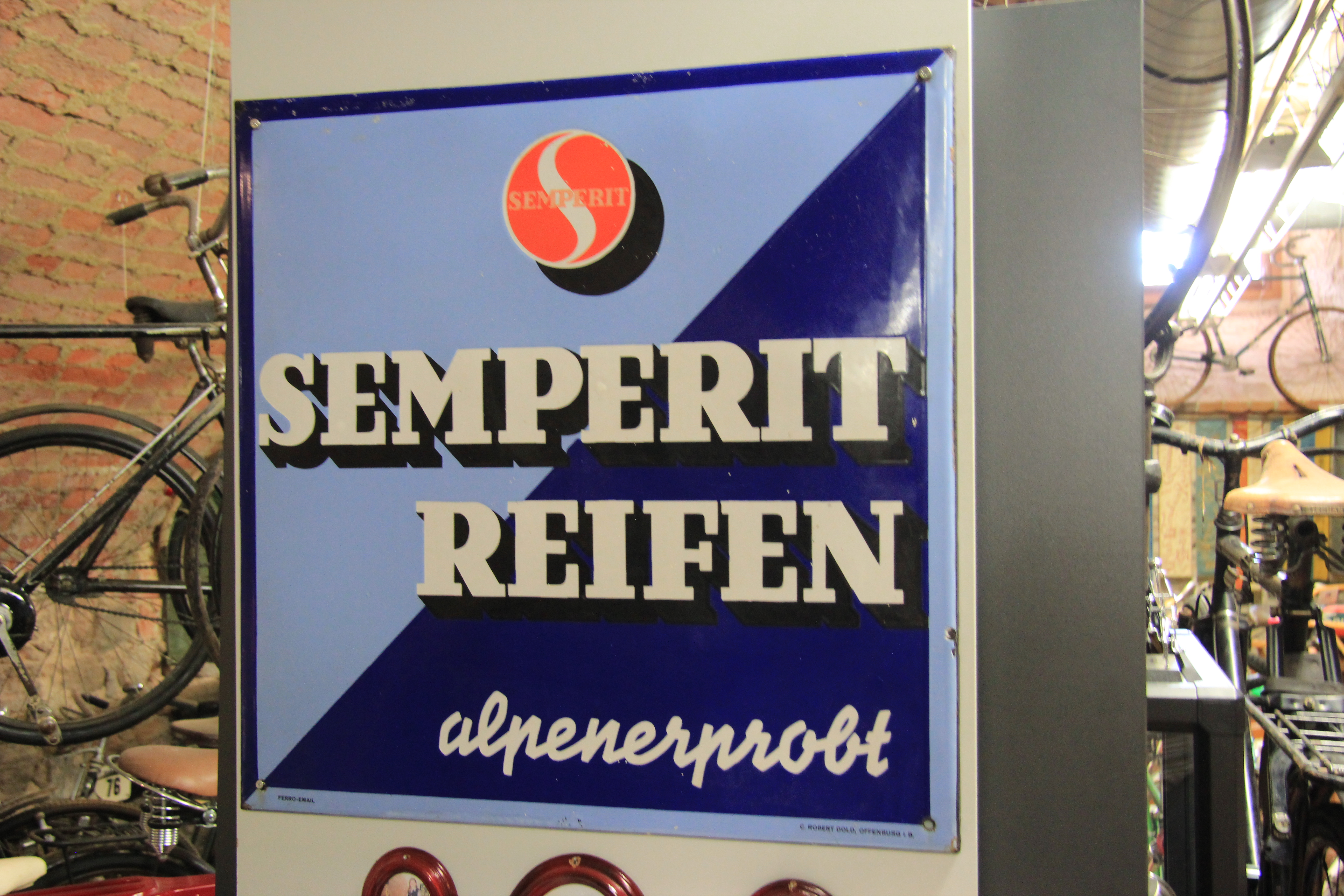 Ausstellungsstücke vorrangig österreichischer Provinienz im Fahrradmuseum in Vösendorf, NIederösterreich